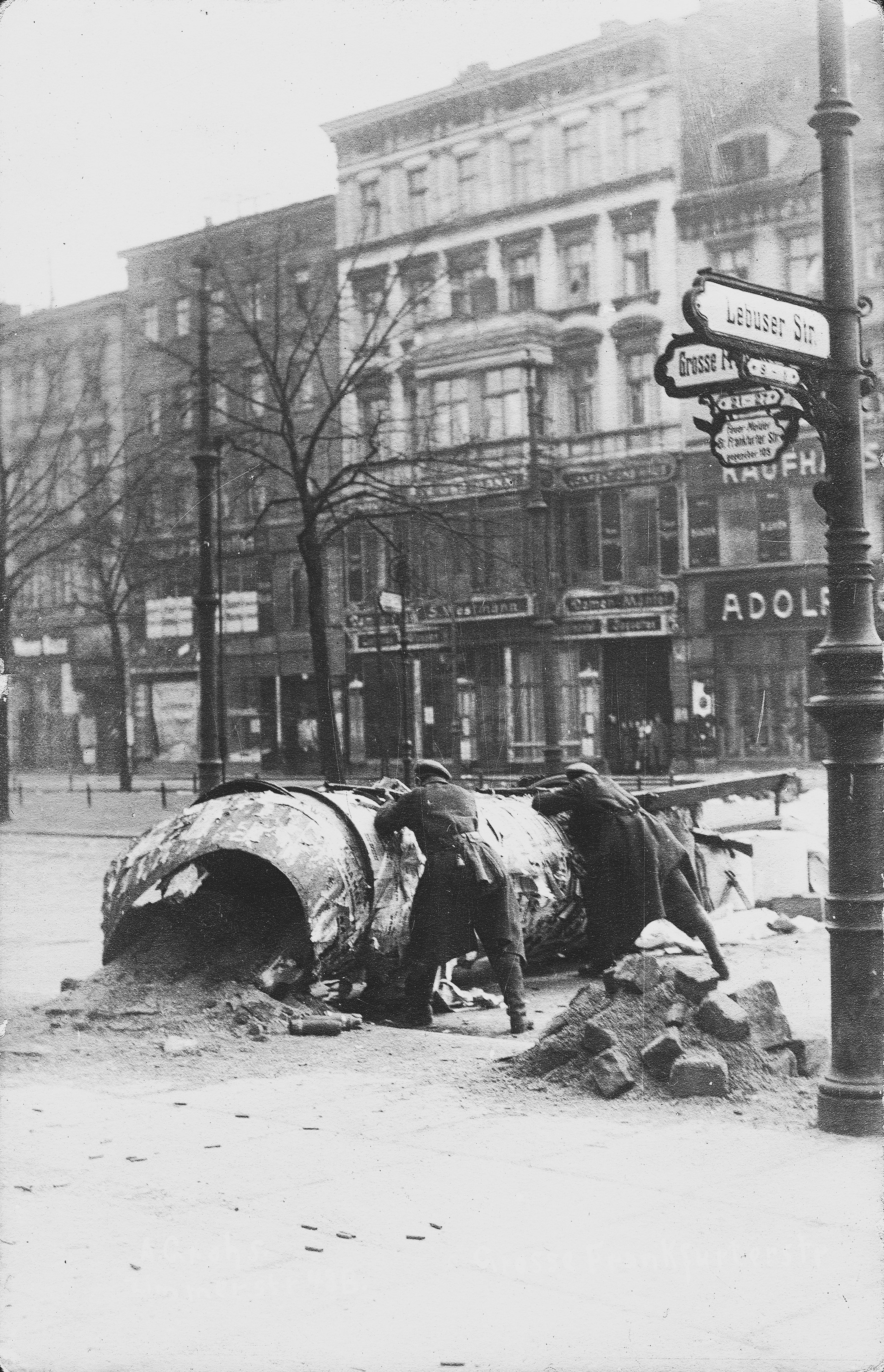 Erst in der Vergrößerung dieses Scans der originalen Echtfoto-Ansichtskarte des Urhebers Alfred Grohs werden Details der Szenerie erkennbar, die eine andere Betrachtungsweise zulassen: Wenn auch die Schärfe der ursprünglichen Aufnahme vergleichsweise enttäuschend ist, so ist die versammelte Gruppe von Schaulustigen im Hauseingang neben dem Bekleidungsgeschäft ("Damen-Mäntel") an der "Große Frankfurter Straße" ein Indiz dafür, dass die auf dem Foto scheinbar zu sehende aktuelle Kampfhandlung der Barrikadenkämpfe während der Novemberrevolution offenbar nicht mehr lebensgefährlich ist. Eine nachgestellte Aufnahme, während der Eltern ihre Kinder zuschauen lassen? Der Erkenntnisgewinn gegenüber dem vom deutschen Bundesarchiv gestifteten Digitalisat ist jedoch enorm: Neben weiteren Details konnte über Wikimedia Commons bisher sowohl der Name des Fotografen als auch der genaue Ort der Aufnahme (auf der heutigen Karl-Marx-Allee) identifiziert werden.